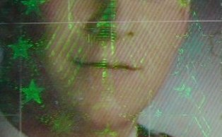 Holographische Elemente ("Identigram") auf der Vorderseite eines deutschen Personalausweises.